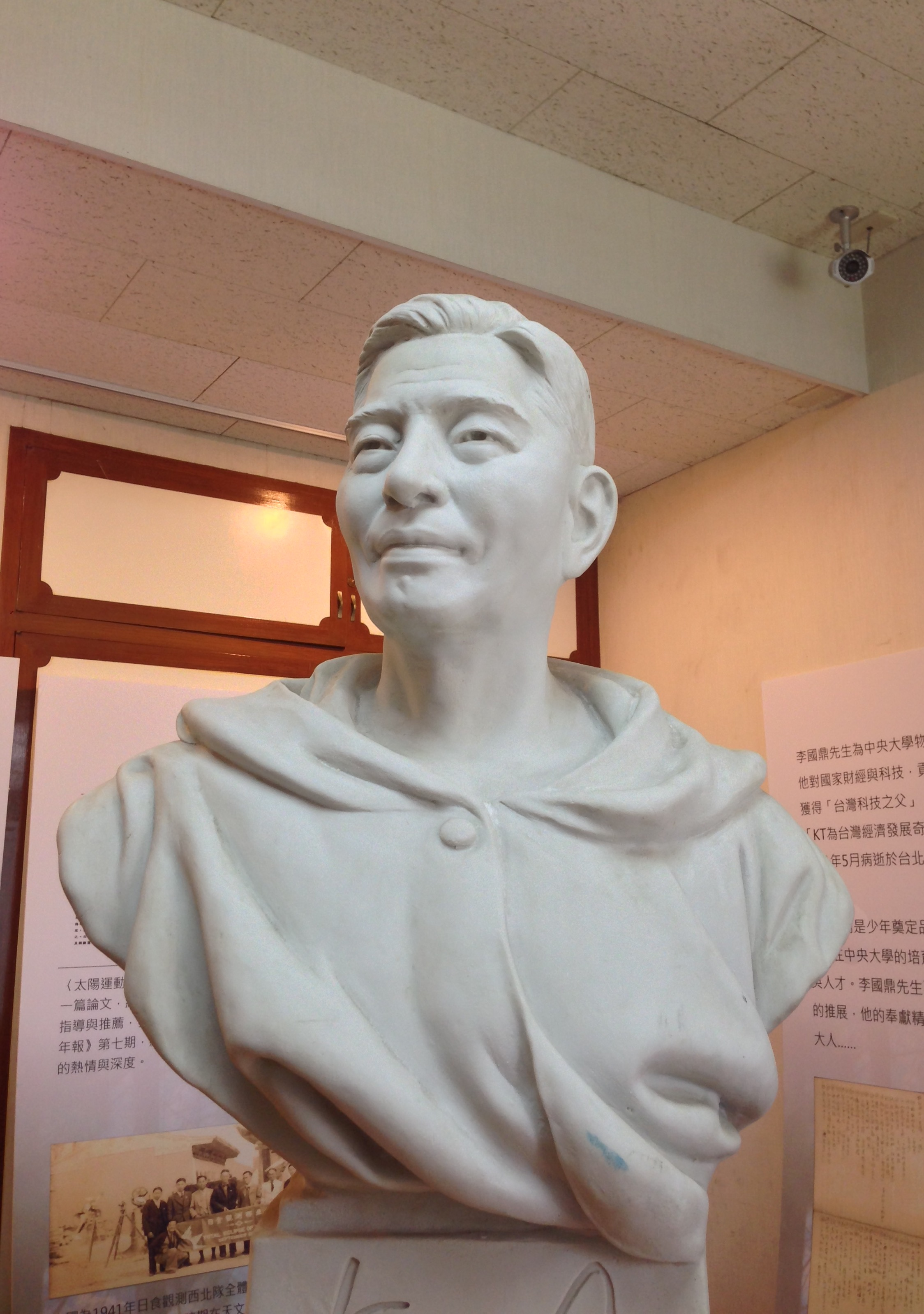 中文（台灣）: 李國鼎故居的李國鼎塑像